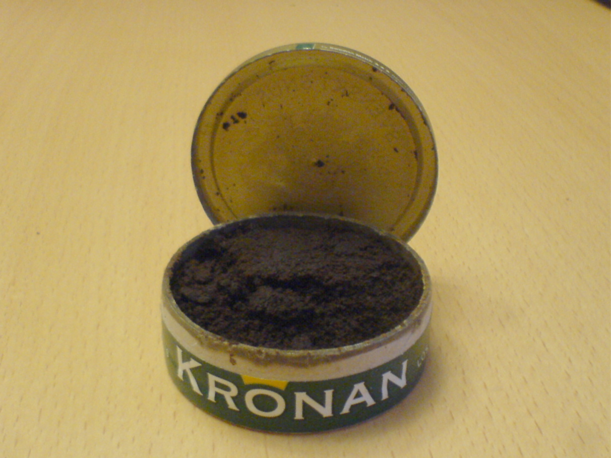 ¨Snusdosa